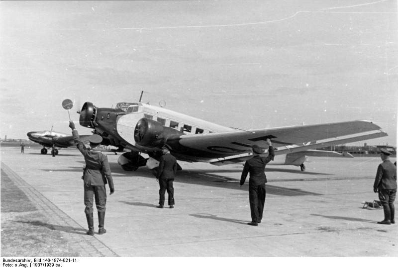 Information added by Wikimedia users.Flughafen München: Eine Junkers Ju 52/3m der Regierungsstaffel ("Major Dincklage", Luftfahrzeugkennzeichen "D-AQIT" vor dem Start. Im Hintergrund ein Heinkel He 111 Verkehrsflugzeug.